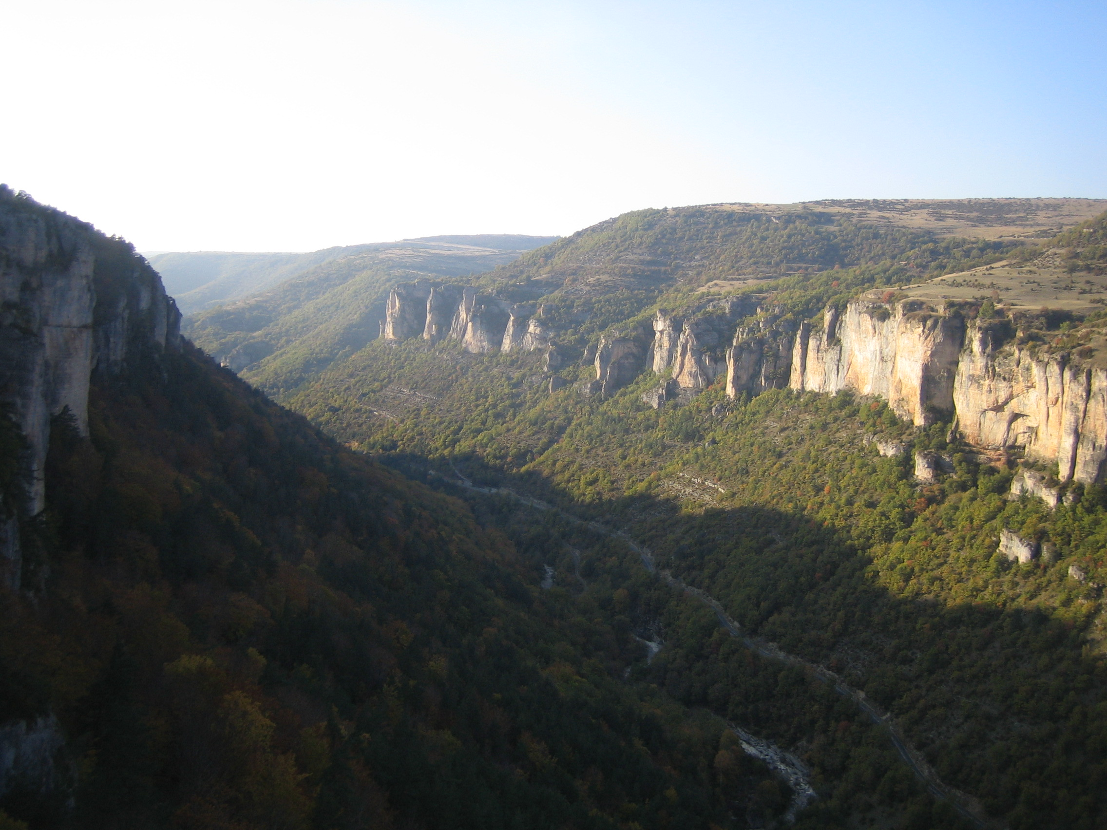 les gorges de la Jonte vues depuis la grotte de Dargilan